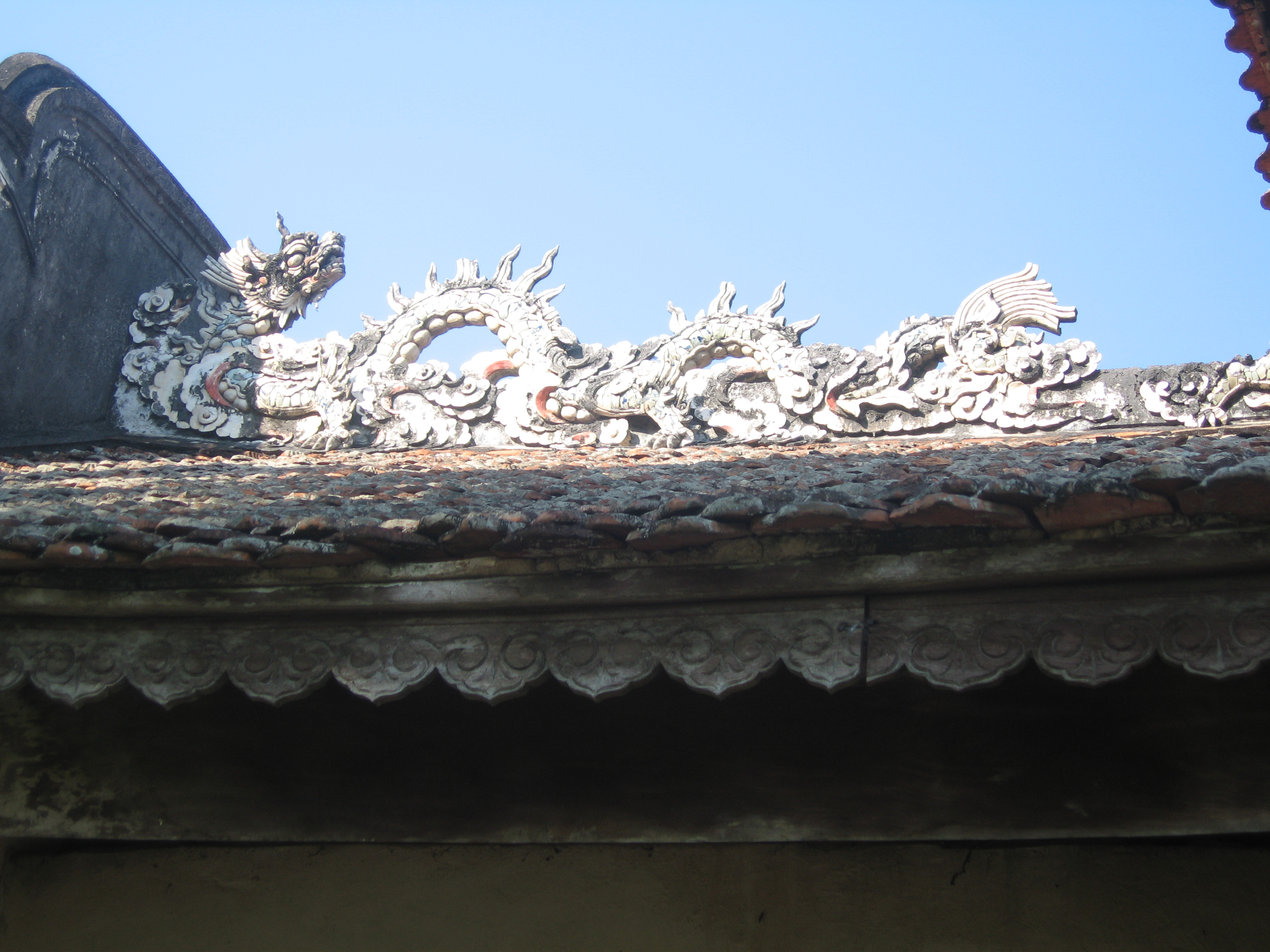 Rồng trên đỉnh mái chùa Trăm Gian, Hải Dương. Hình do Casablanca1911 chụp.